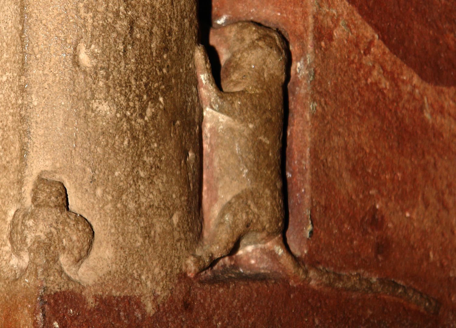 Bremer St. Petri Dom: Die Dom-Maus (etwa 10 cm hoch) befindet sie auf dem Ostchor am Fuße des Portals an der rechten Seitenwand. Das Rundbogenportal stammt aus der 2. Hälfte des 11. Jahrhunderts (1060 - 1100) und war ursprünglich ein Eingangsportal außen an der alten Westfront des Domes zum Marktplatz hin. Die Maus war im Mittelalter ein Symbol für Hexen und Teufel, die - als Bannung des Bösen - am Betreten der Kirche gehindert werden sollten. (Qu.: Das Relief unten links ist eine in der romanischen Baukunst häufig vorkommende Überleitung (in Form eines Blattes) zwischen der Ecke der rechteckigen Plinthe und der runden Säulenbasis